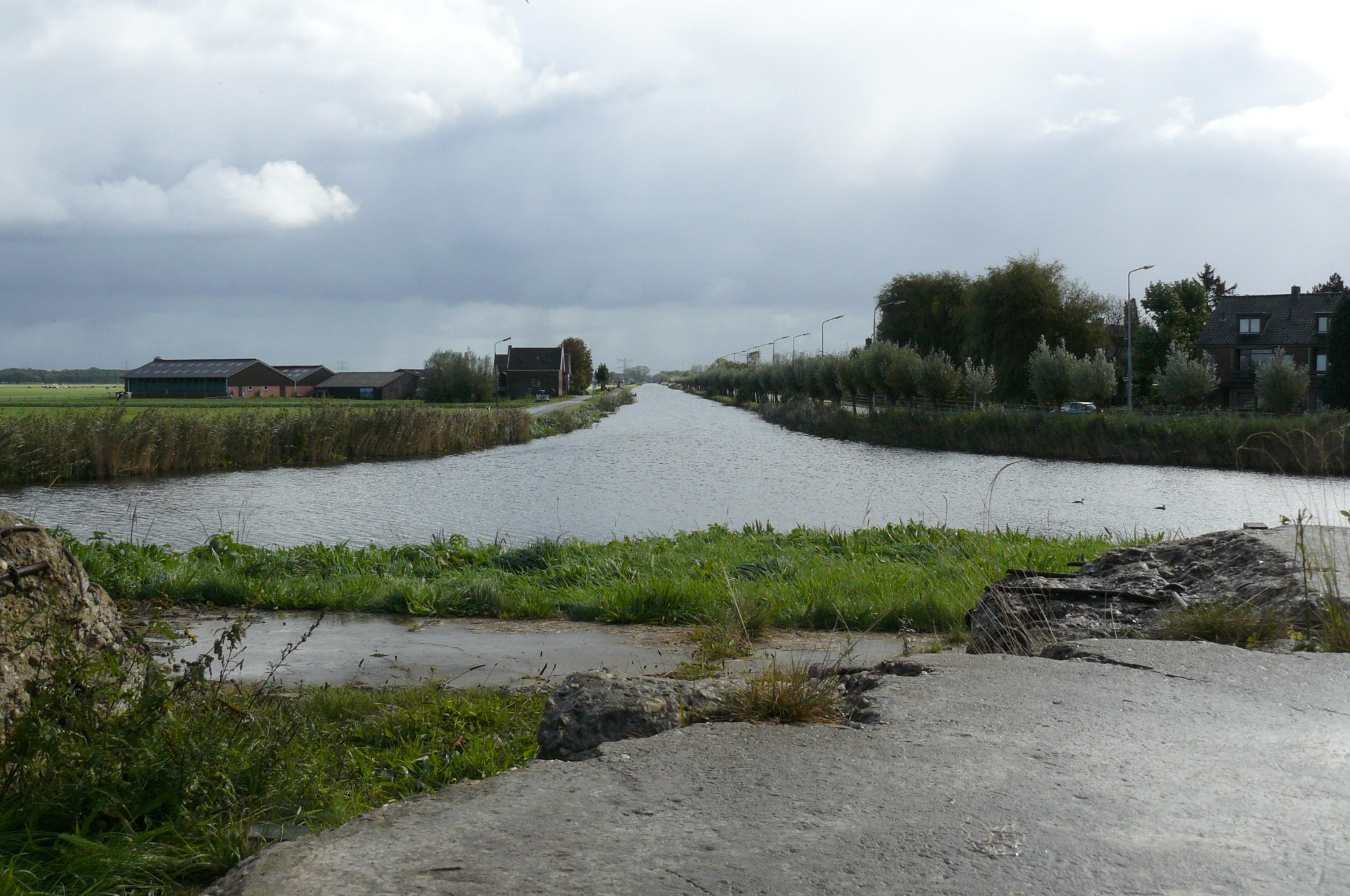 Zicht op de Naardertrekvaart. Foto genomen vanaf Muizenfort te Muiden in de richting van Naarden.